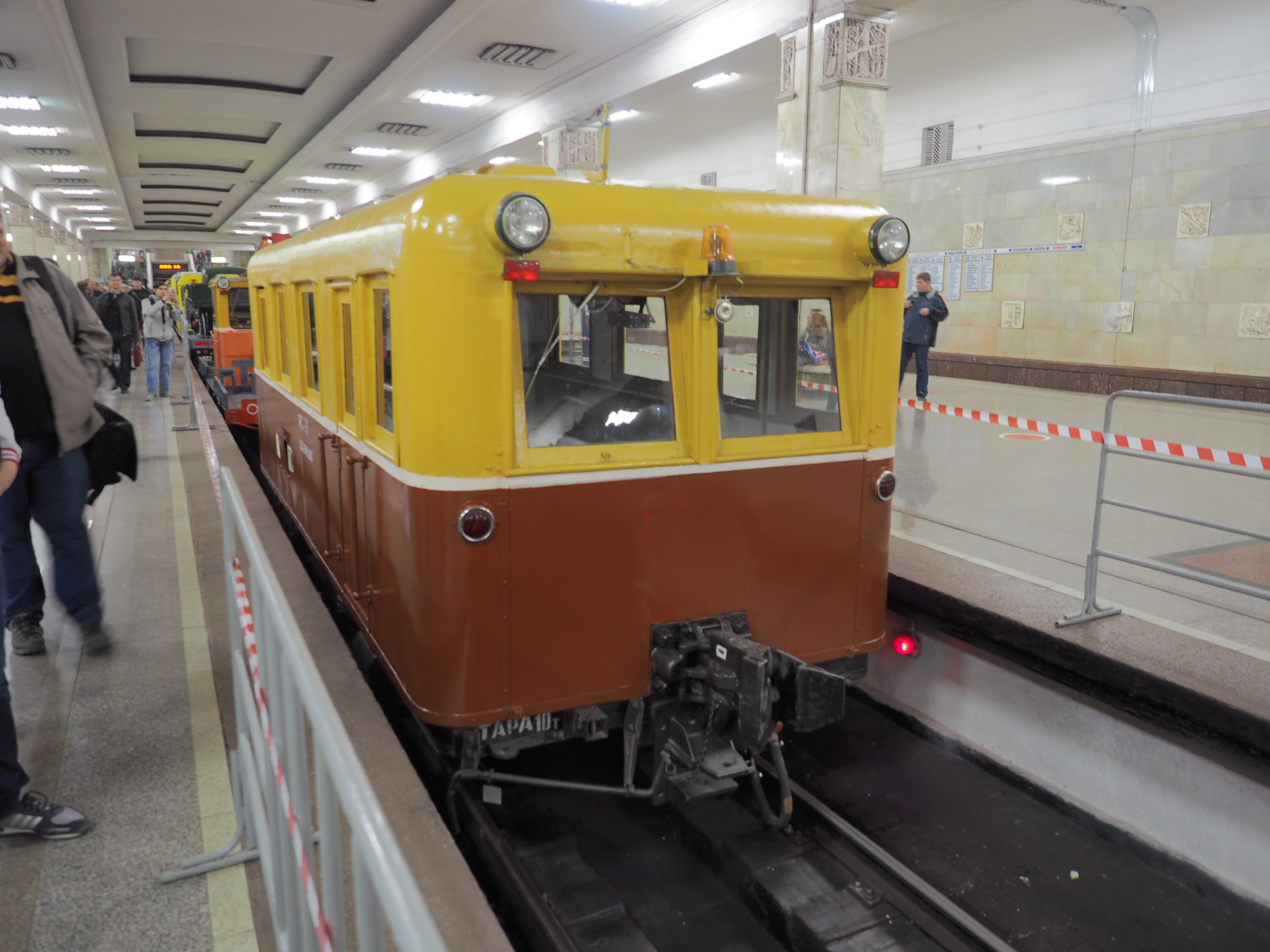 Автомотриса АС1-19. Moscow metro maintenance railcar AS1-19. On May 15 and 16, 2015, Moscow Metro celebrated its 80th anniversary. For the first time, service cars were exhibited at the siding track of Partizanskaya station. Earlier, historical cars were exhibited there. 15 и 16 мая 2015 в Москве отмечалось 80 лет Московскому метро. Впервые была устроена выставка служебных вагонов. Они были расставлены на 3 пути станции Партизанская. Перед этим также проводилась выставка музейных вагонов